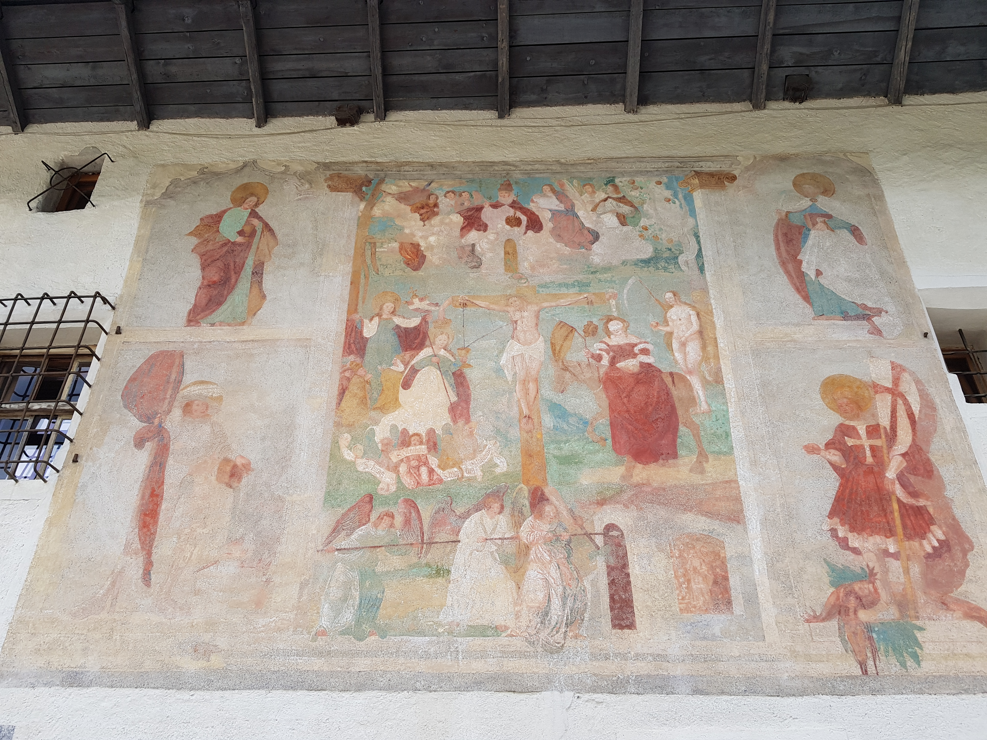 Kreuzigungsfresko (um 1520), Hannesmühle, Mühlgasse 4, Bruneck, Südtirol